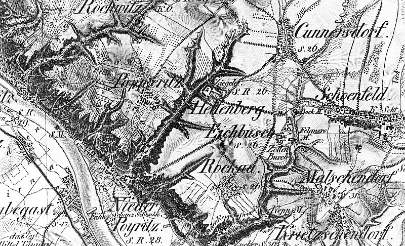 Original image description from the Deutsche Fotothek Dresden-Helfenberg. Oberreit, Sect. Dresden, 1821/22